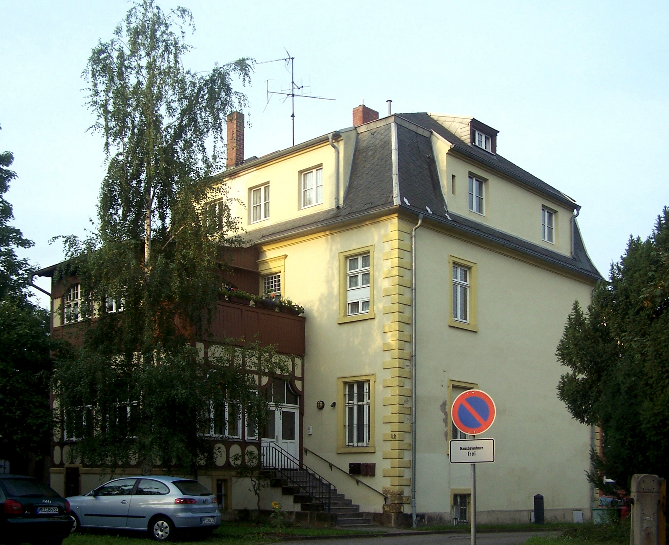 Pestalozzistr. 12 in Radebeul